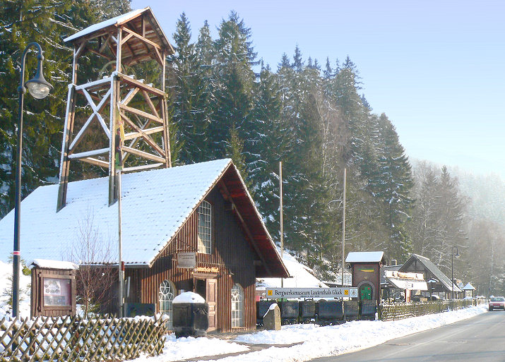 Eingang des Bergbaumuseums auf dem Gelände des ehemaligen Silberbergwerks "Lautenthals Glück" in Lautenthal, Niederschsen, Deutschland.